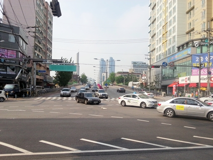 심곡고가교(신흥로 시작). 좌측(경인로 인천방향), 우측(경인로 서울방향).